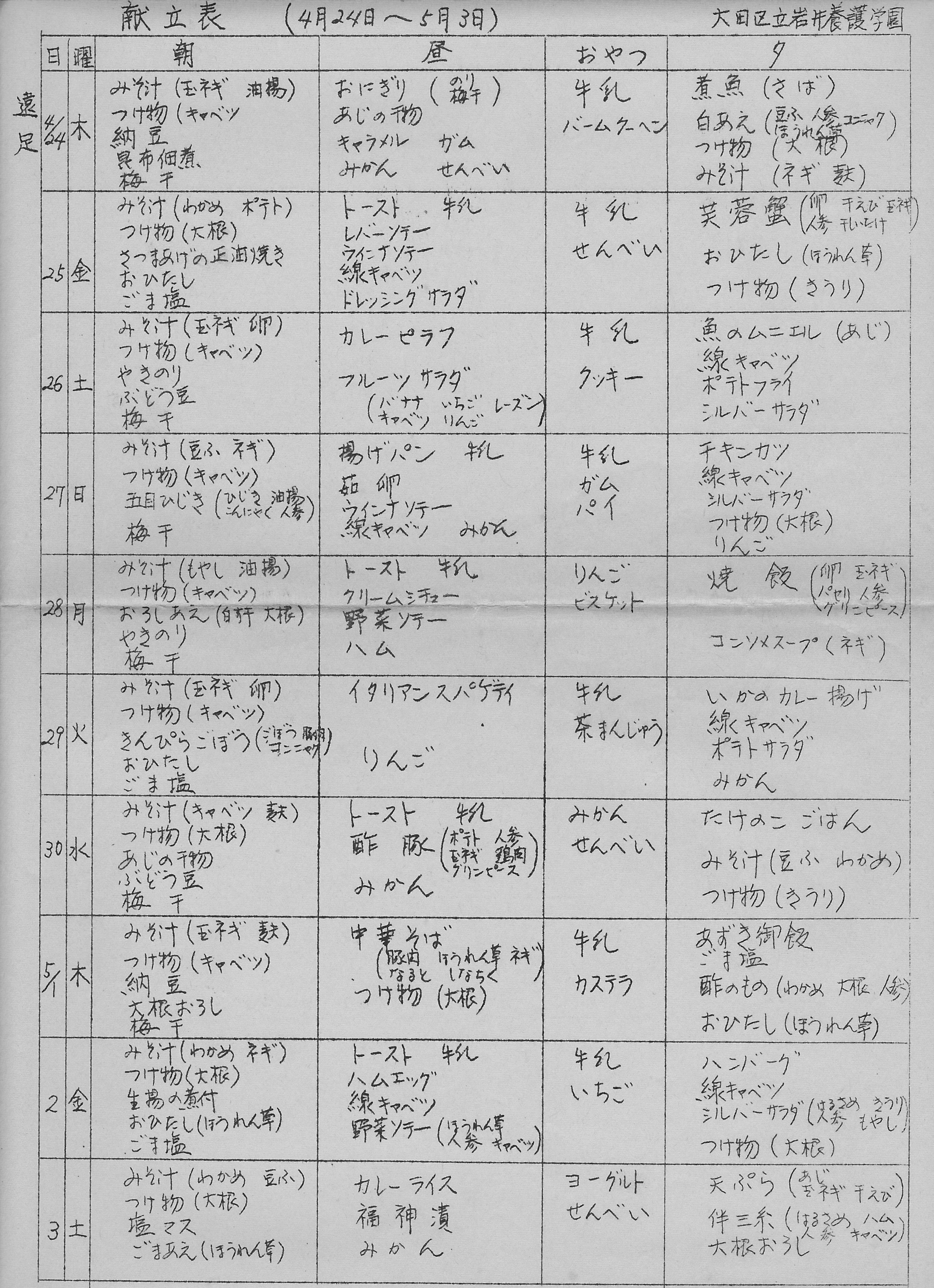 昭和44年当時の同学園給食献立表